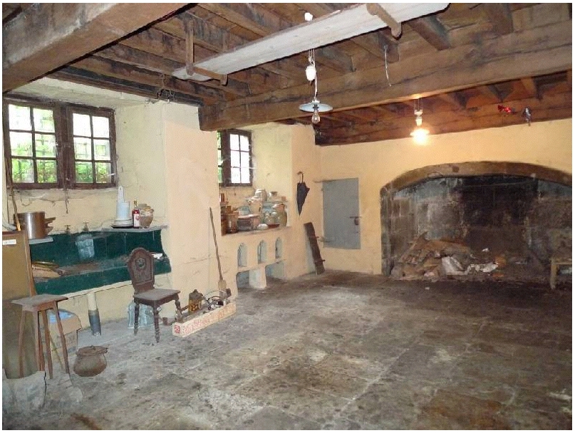 Chateau Cantal, cuisine avec cantou et potager.